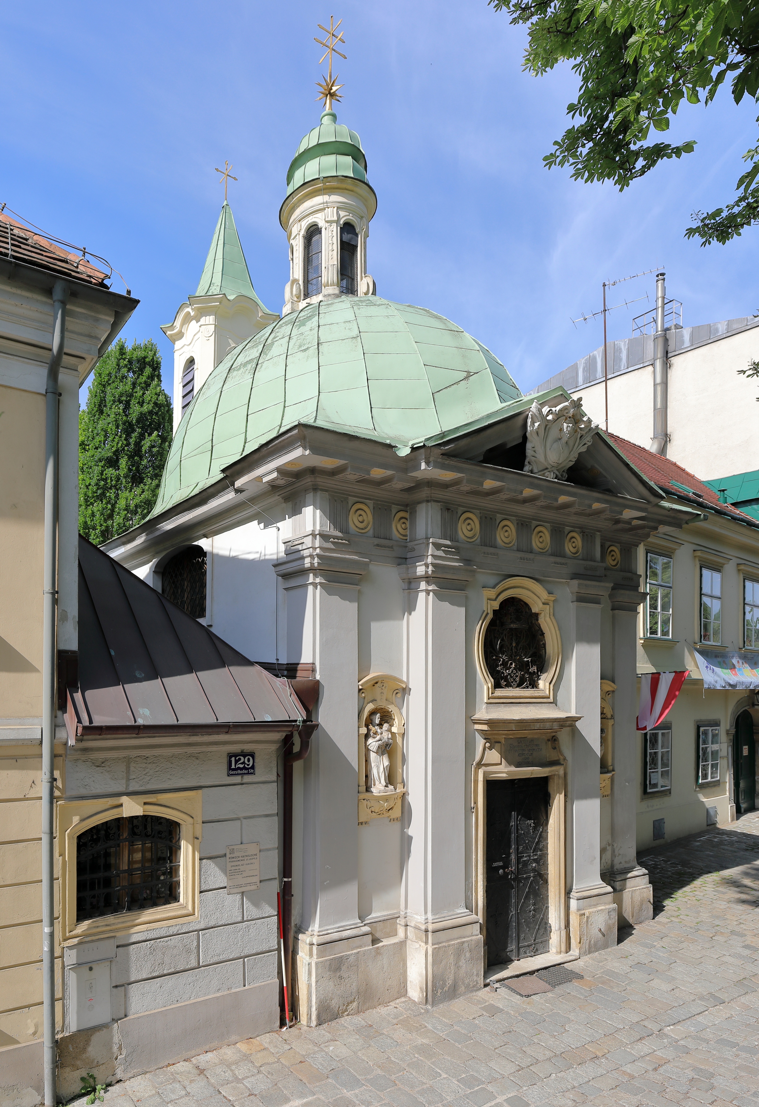 Die Johannes-Nepomuk-Kapelle an der Adresse Gersthofer Straße 129 in Gersthof, ein Wiener Stadtteil im 18. Gemeindebezirk Währing.Den kleinen Zentralbau mit laternenbekrönter Kuppel und Glockentürmchen ließ sich der Hofkriegsrat Matthäus Lidl von Schwanau 1736/1737 als Haus- und Grabkapelle errichten. Ende des 18. Jahrhunderts diente die Kapelle auch als Gersthofer Pfarrkirche.